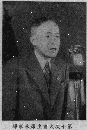 第一屆國民大會專輯圖片